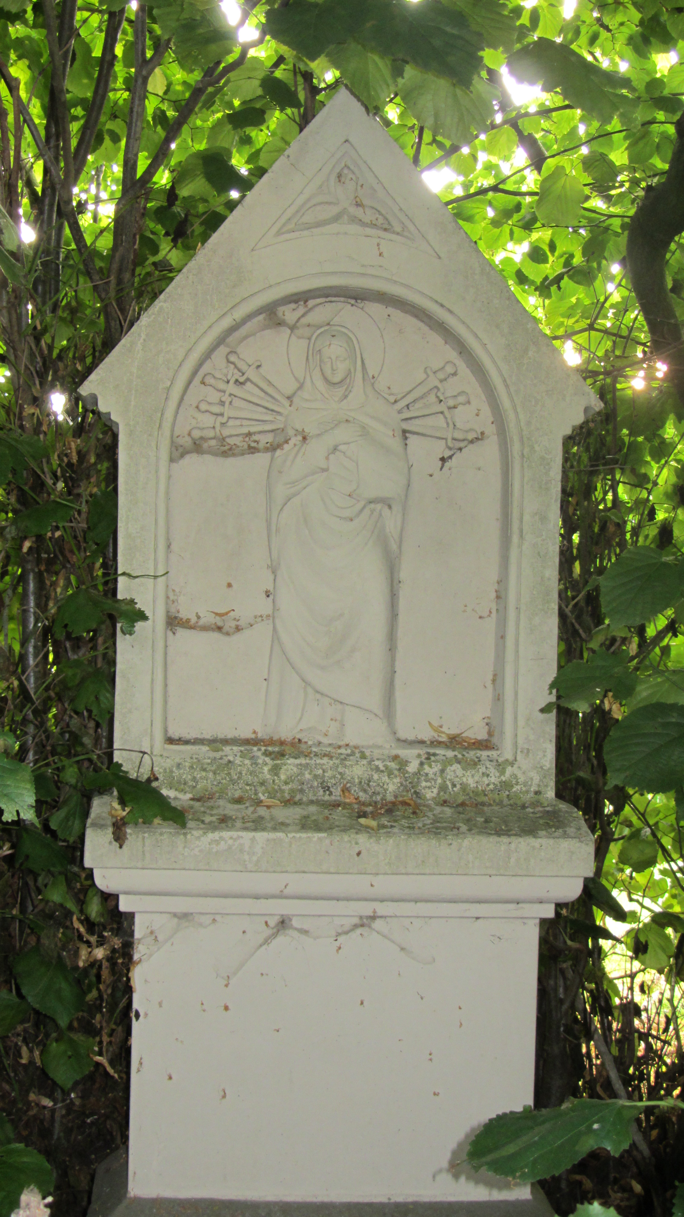 Die sieben Schmerzen Mariens, Bildstock in Rengering, vormals zum Kloster gehörend